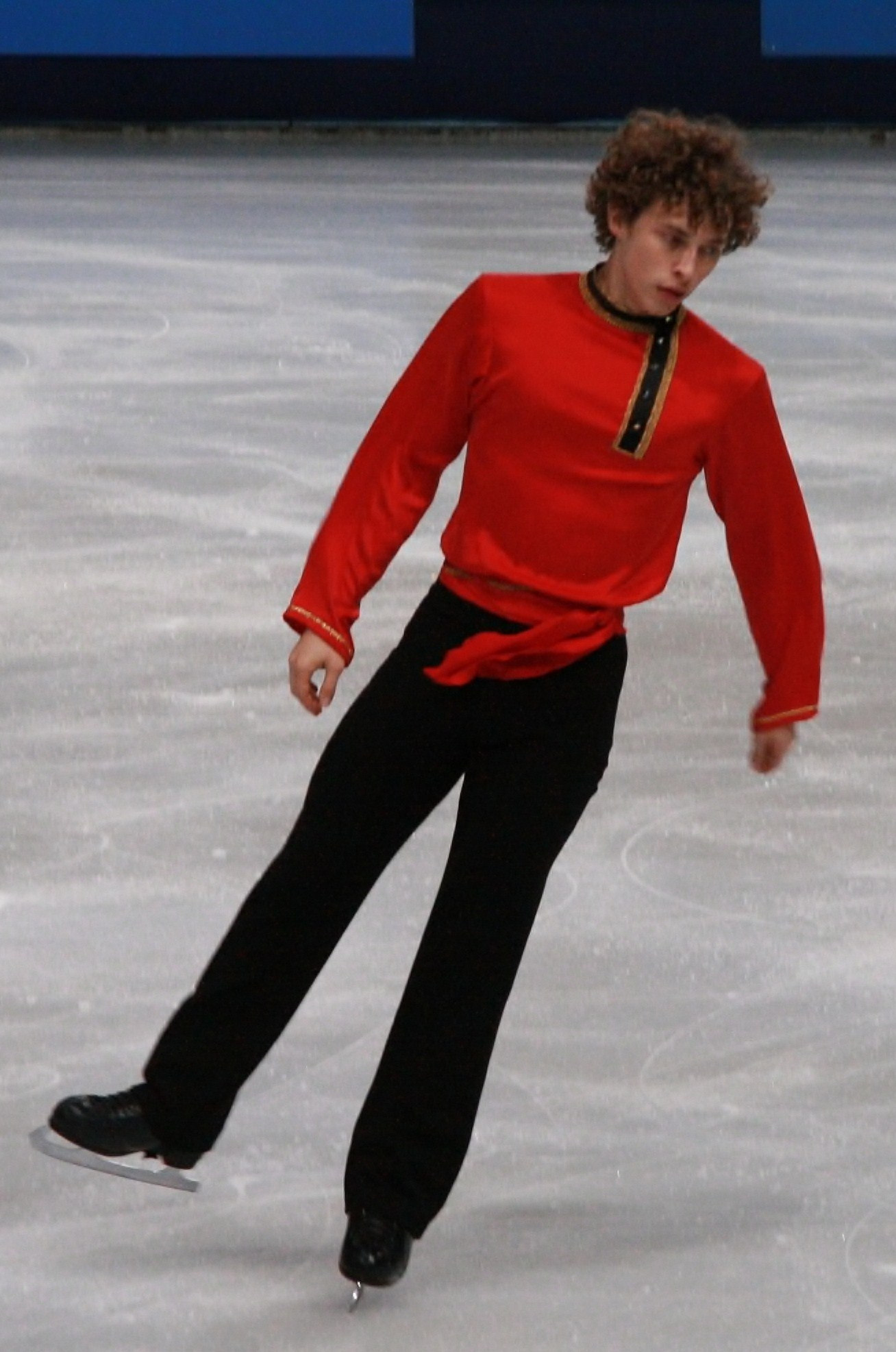 Адам Риппон на 2011 Trophée Eric Bompard